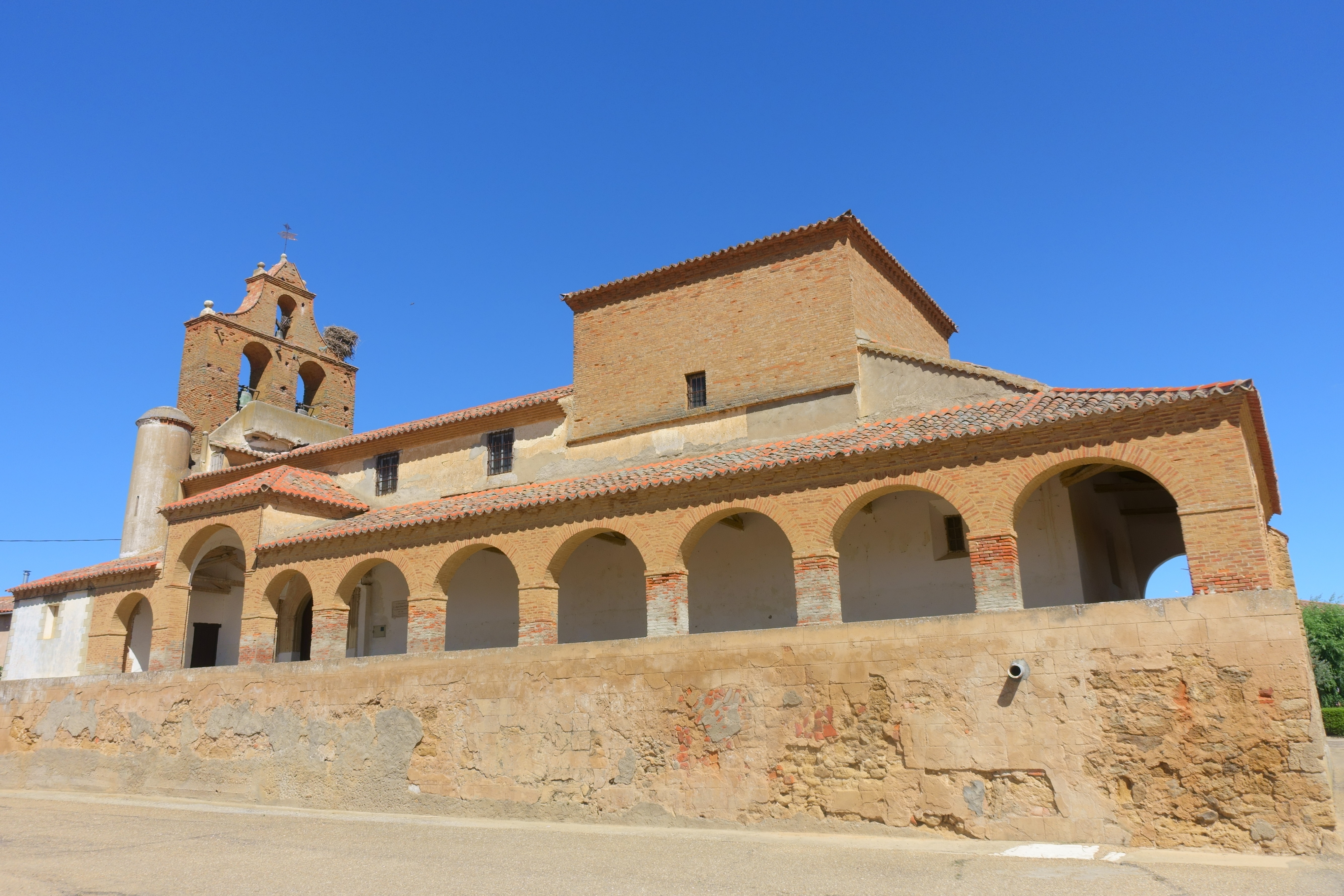 Iglesia de San Babilés, Quintanilla del Olmo (Zamora, España).